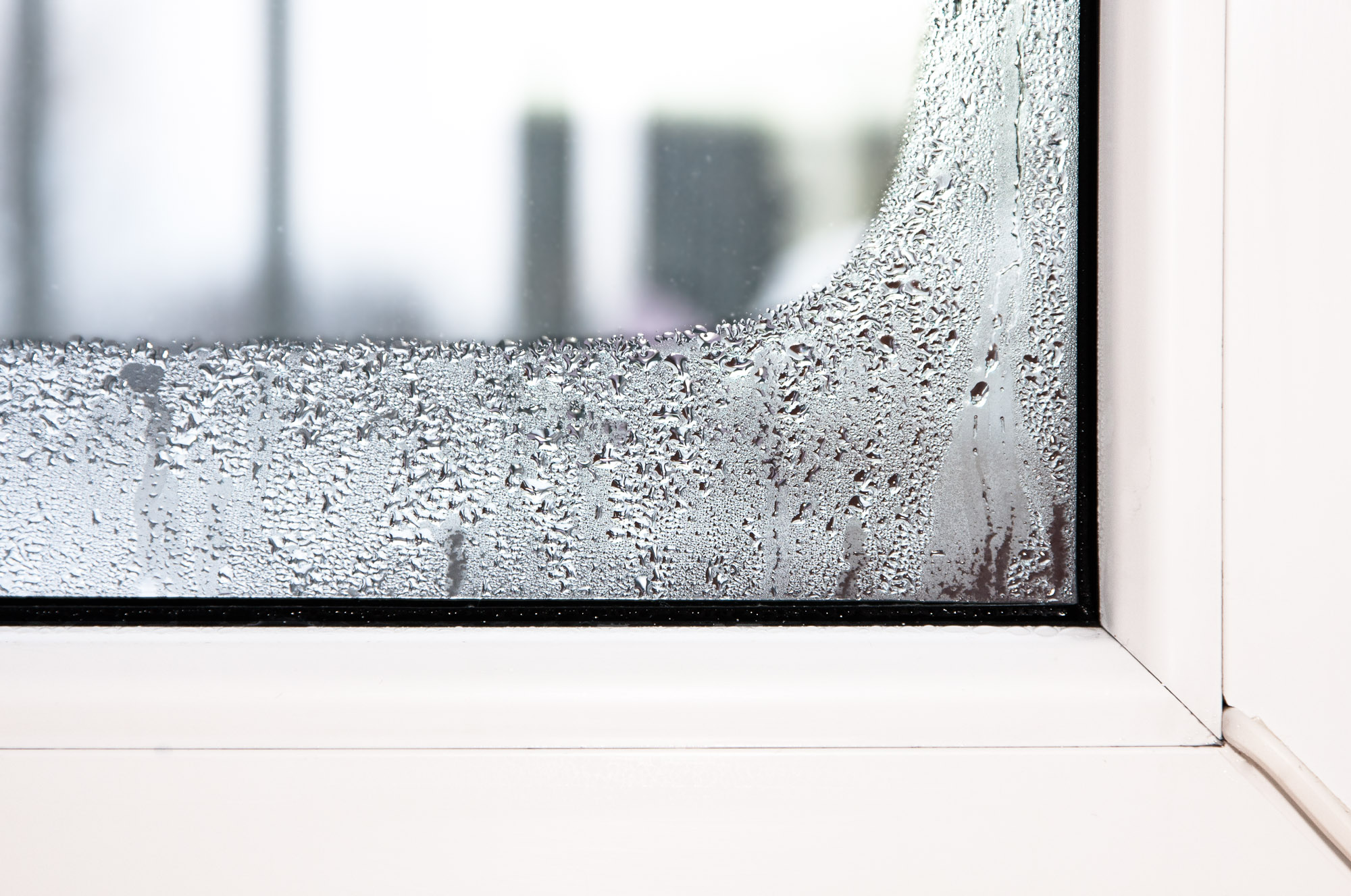 Kondenswasser entsteht oft an modernen 2 oder 3 fach verglasten Scheiben im Randbereich. Dies kann meist nur durch den nachträglichen Einbau einer Fensterheizung verhindert werden.